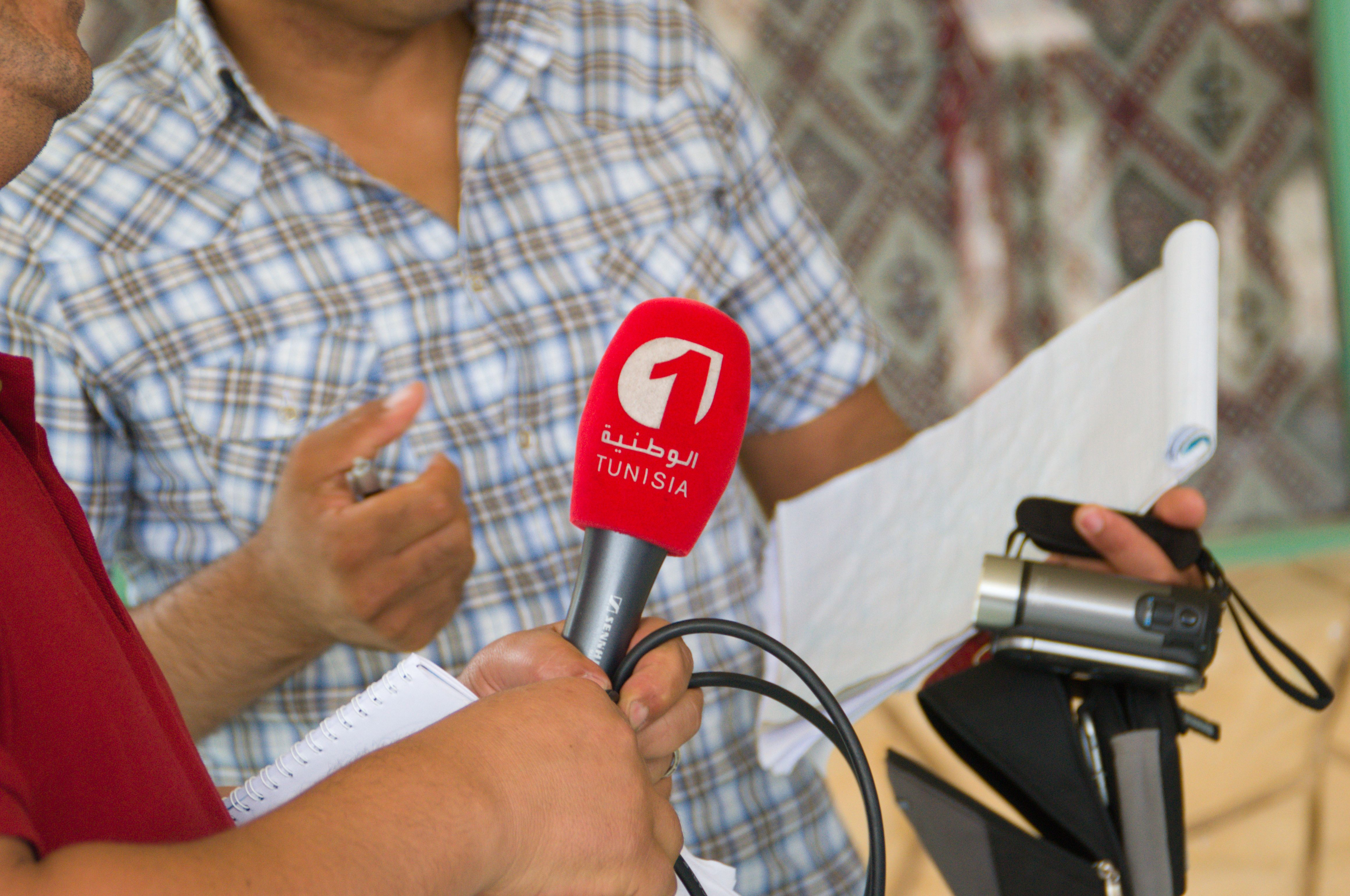 Journalistes de la télévision tunisienne, se préparent à réaliser une interview.